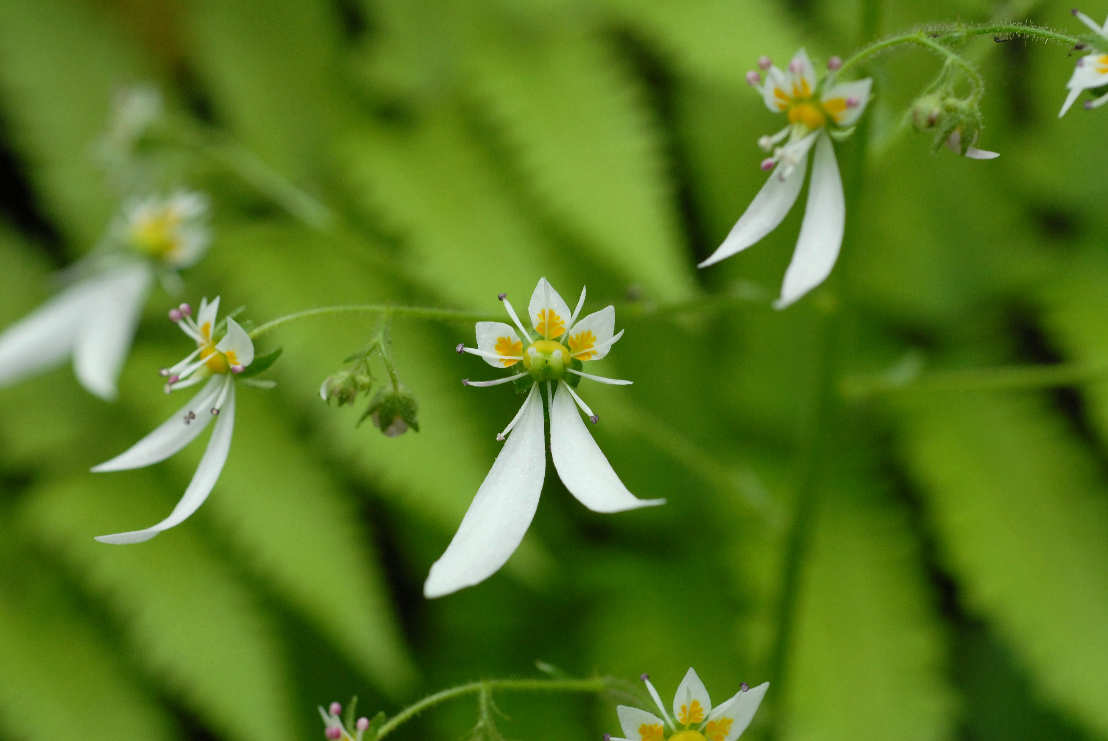 ハルユキノシタの花 Saxifraga nipponica Makino